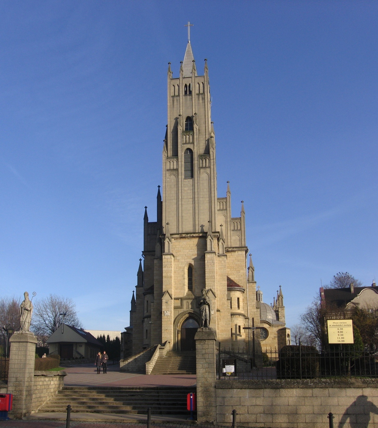 kościół pw. Matki Boskiej Szkaplerznej w Imielinie